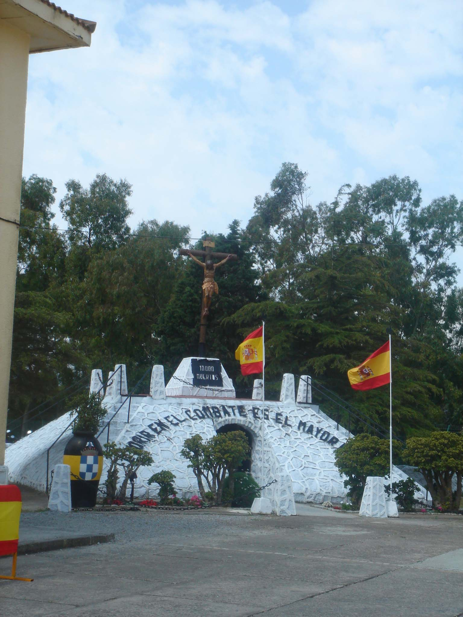 Monumento a los caidos en el acuartelamiento de la Legión de Ceuta